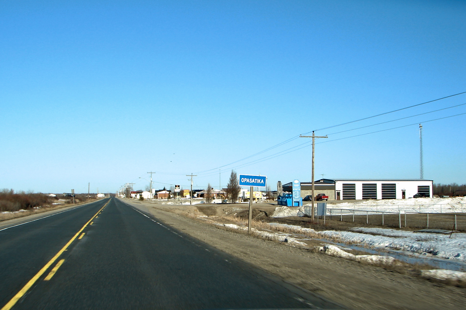 Highway 11 at Opasatika, Ontario, Canada